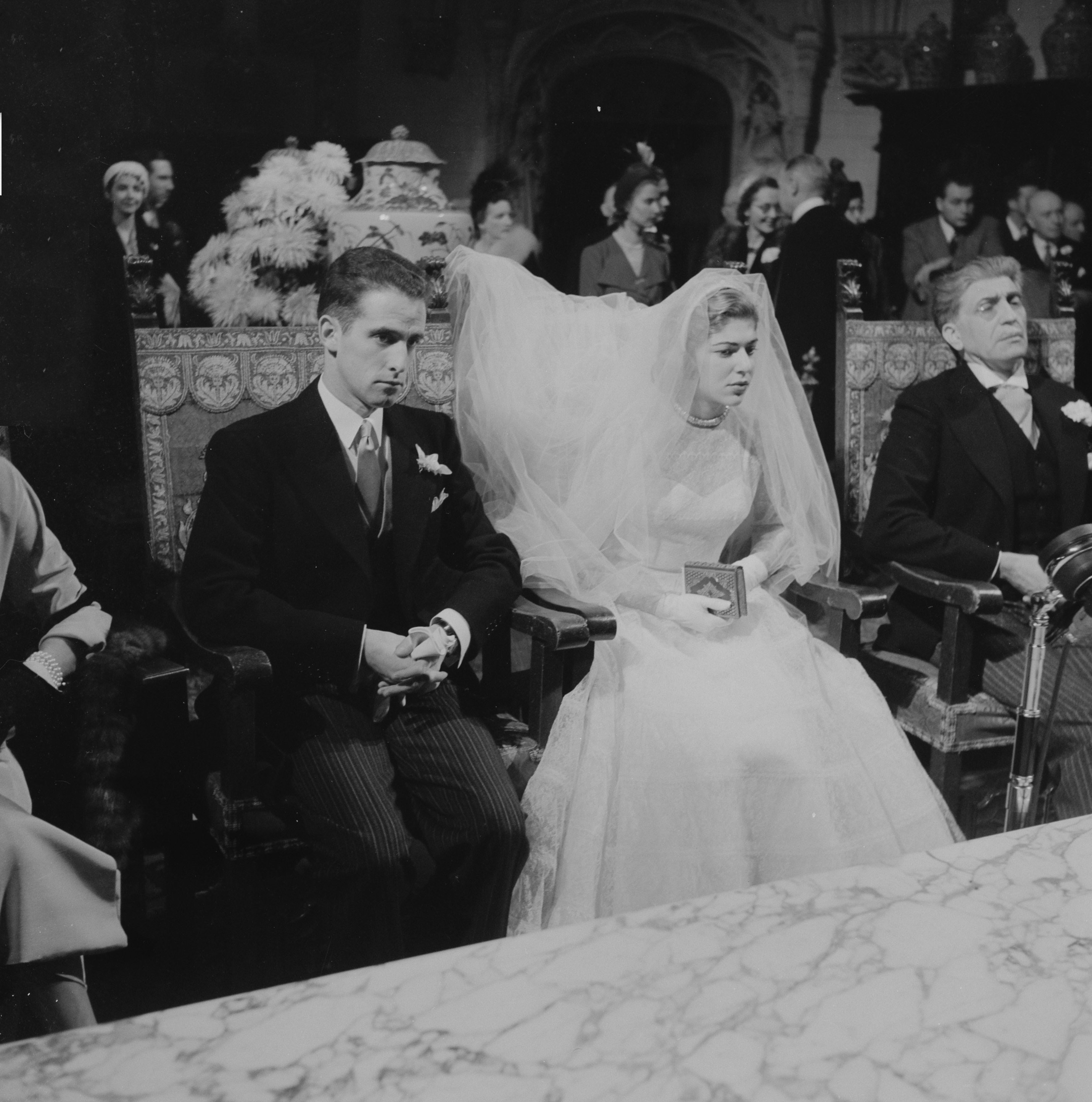 Collectie / Archief : Fotocollectie Anefo Reportage / Serie : [ onbekend ] Beschrijving : Huwelijk te Haarzuilen Graaf Van Nicolay Barones van Zuilen van Nijevelt van der Haan Datum : 11 oktober 1950 Locatie : Haarzuilens Trefwoorden : huwelijken Persoonsnaam : Barones van Zuilen van Nijevelt van der Haan Fotograaf : Noske, J.D. / Anefo Auteursrechthebbende : Nationaal Archief Materiaalsoort : Negatief (zwart/wit) Nummer archiefinventaris : bekijk toegang 2.24.01.03 Bestanddeelnummer : 904-2412 Reacties Geplaatst door Maaike op 01 oktober 2013 - 16:53. Huwelijk te Haarzuilen. Graaf François de Nicolay en barones Marie-Hélène Naila Stéphanie Josina barones van Zuylen van Nyevelt van de Haar Persoonsnamen: barones M.H.N.S.J. van Zuylen van Nyevelt van de Haar, graaf François de Nicolay